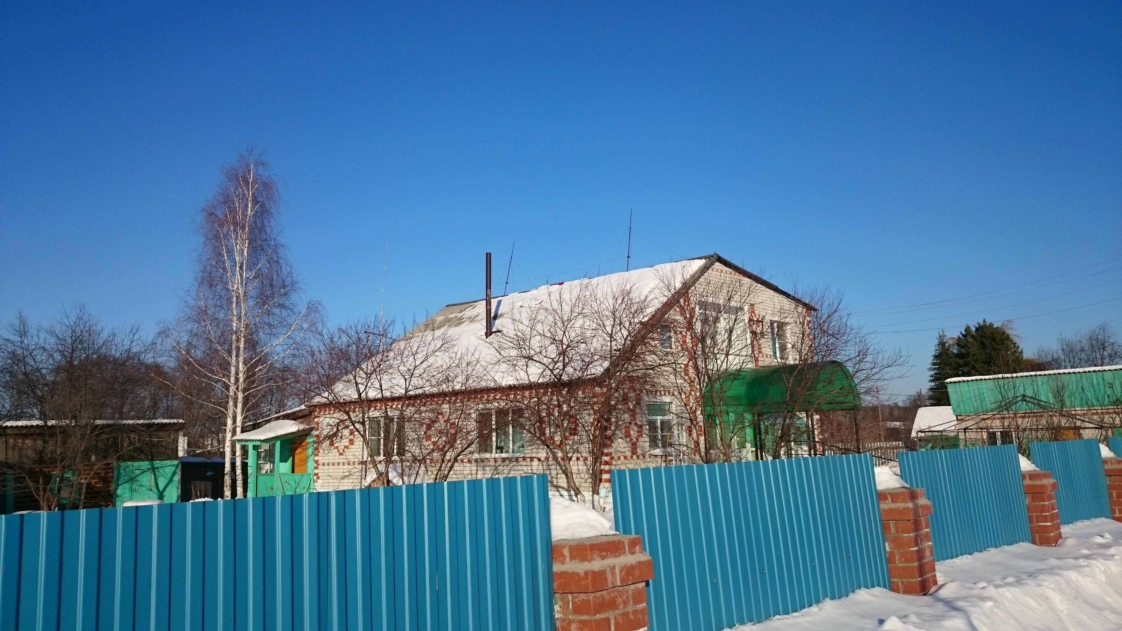 "Золушка"